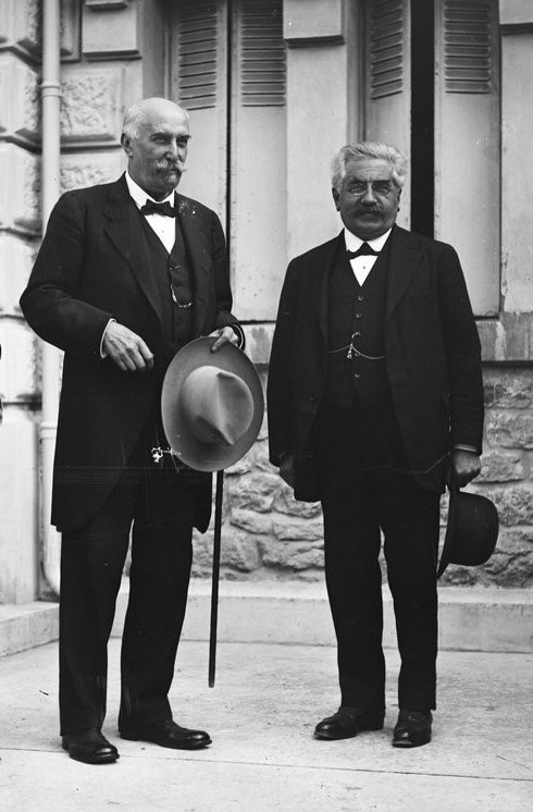 Giovanni Giolitti, président du Conseil des ministres d'Italie, et Alexandre Millerand, président du Conseil français, à l'hôtel Mirabeau, lors de la conférence d'Aix-les-Bains.